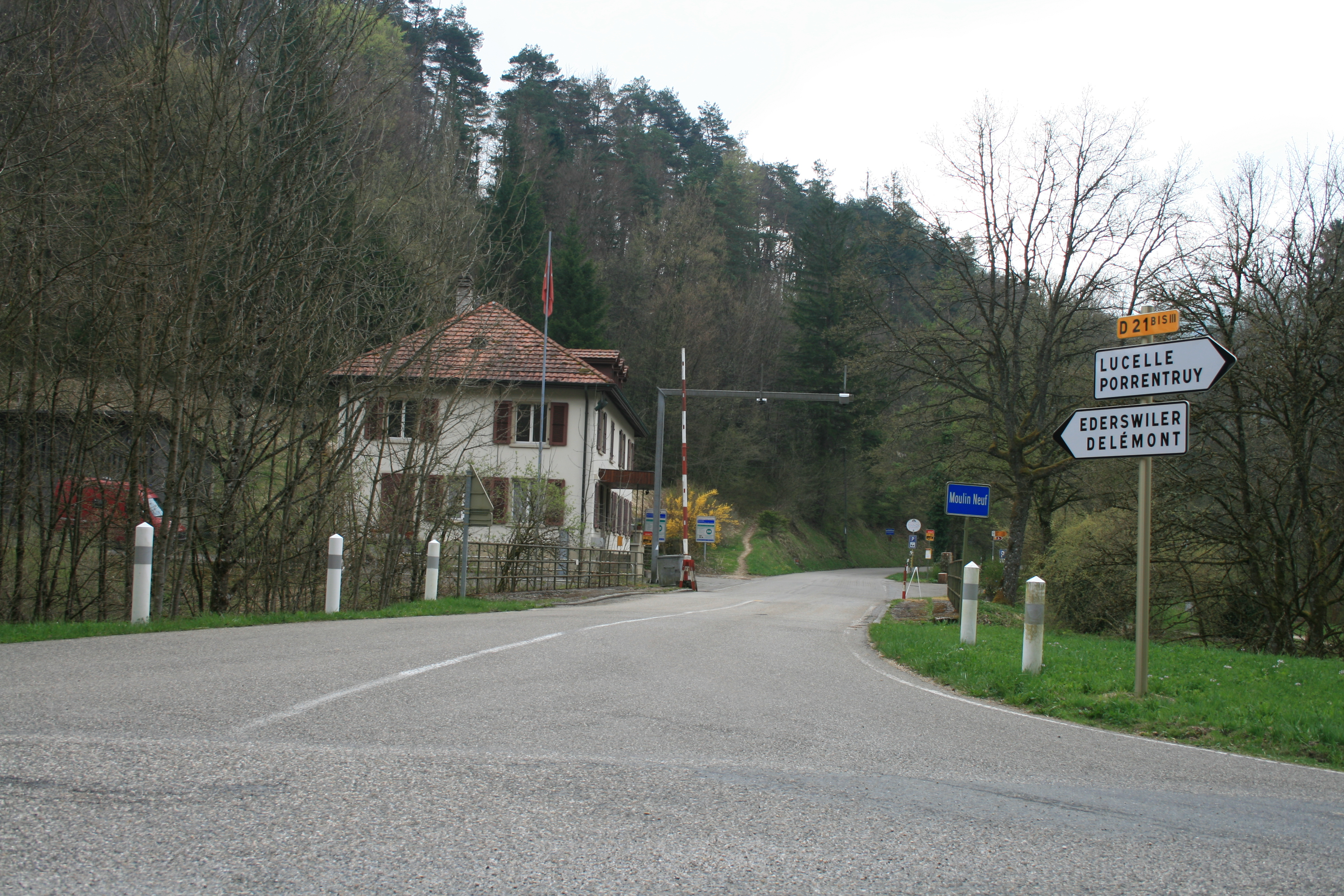 Neumühle/Moulin Neuf an der Grenze zwischen Roggenburg und Kiffis